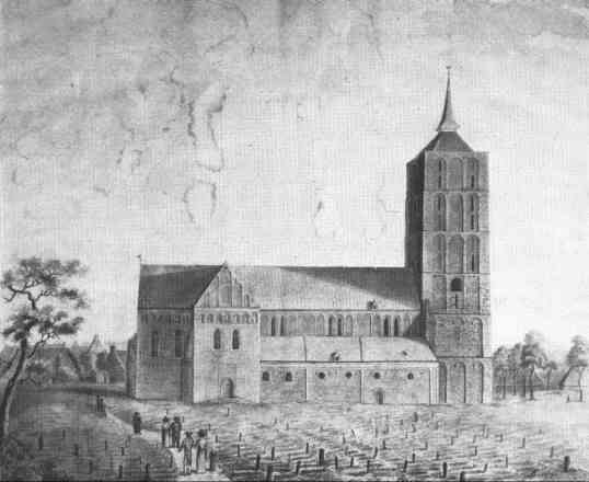 Die Kirche von Marienhafe auf einem Aquarell von vor 1829.